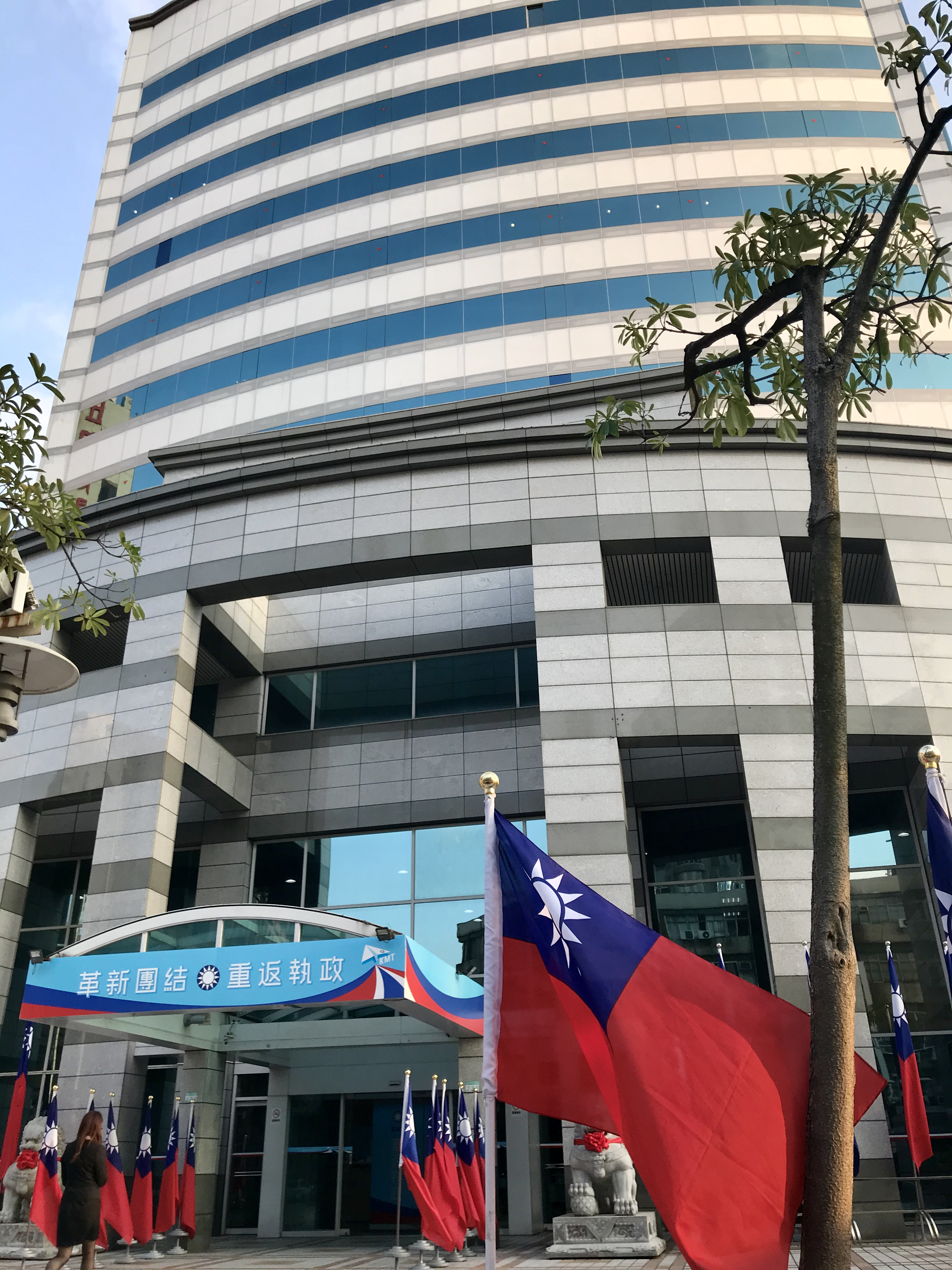 中国国民党中央党部